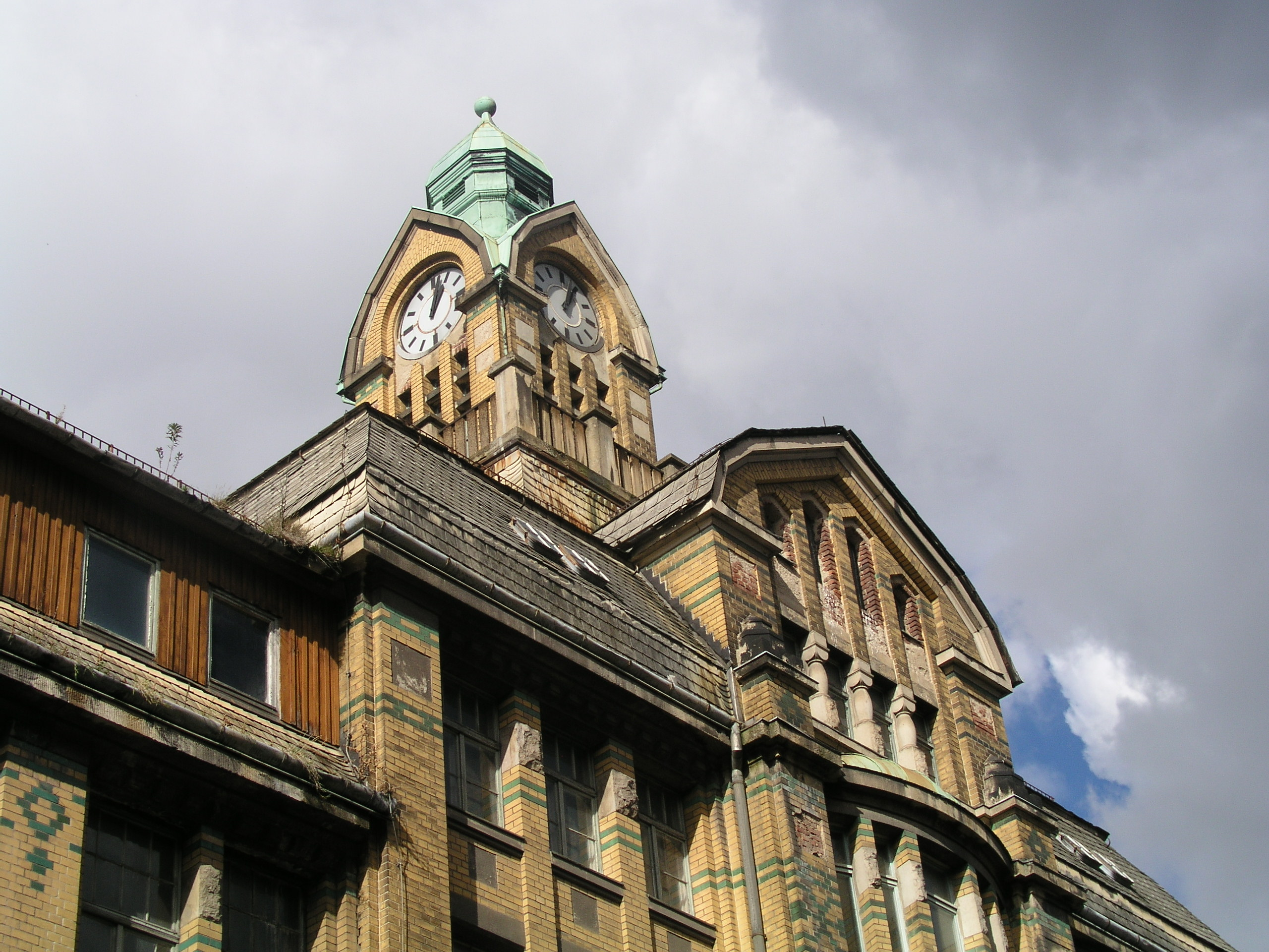 Giebeldekoration Wellner (3)